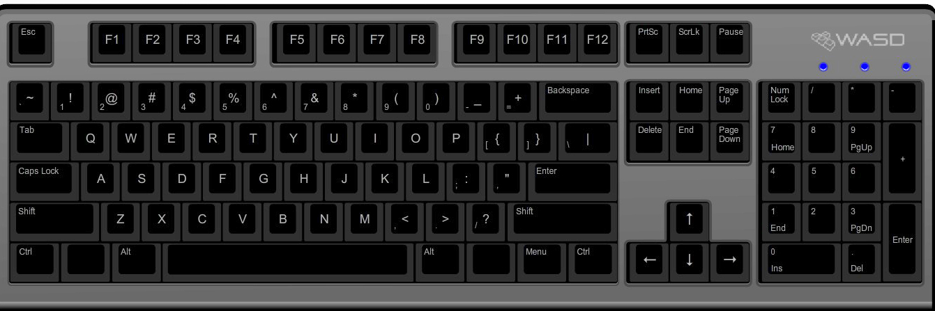 US ANSI-standard for et tastatur, med amerikansk qwerty-oppsett. Den har 104 taster, inkludert de numeriske tastene.